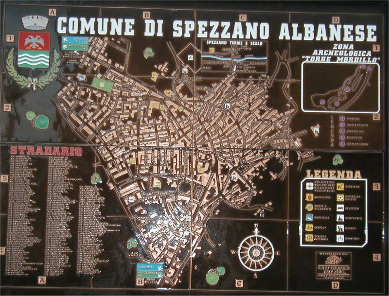 Spezzano Albanese - Mappa Foto di Luigino C.